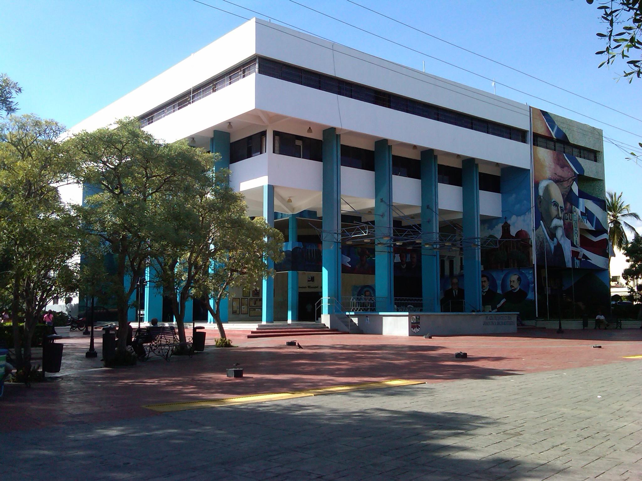 Ayuntamiento de Baní